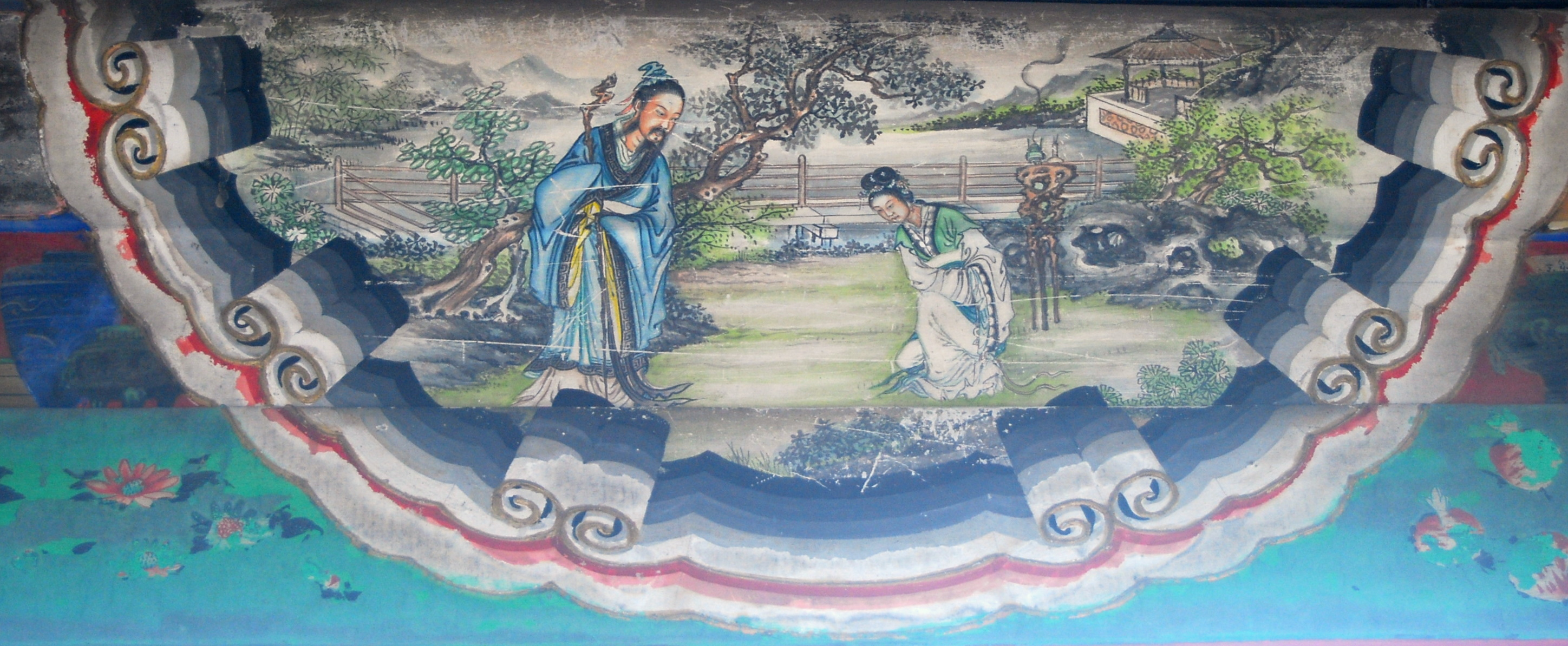 颐和园长廊上的彩绘：王允巧设连环计